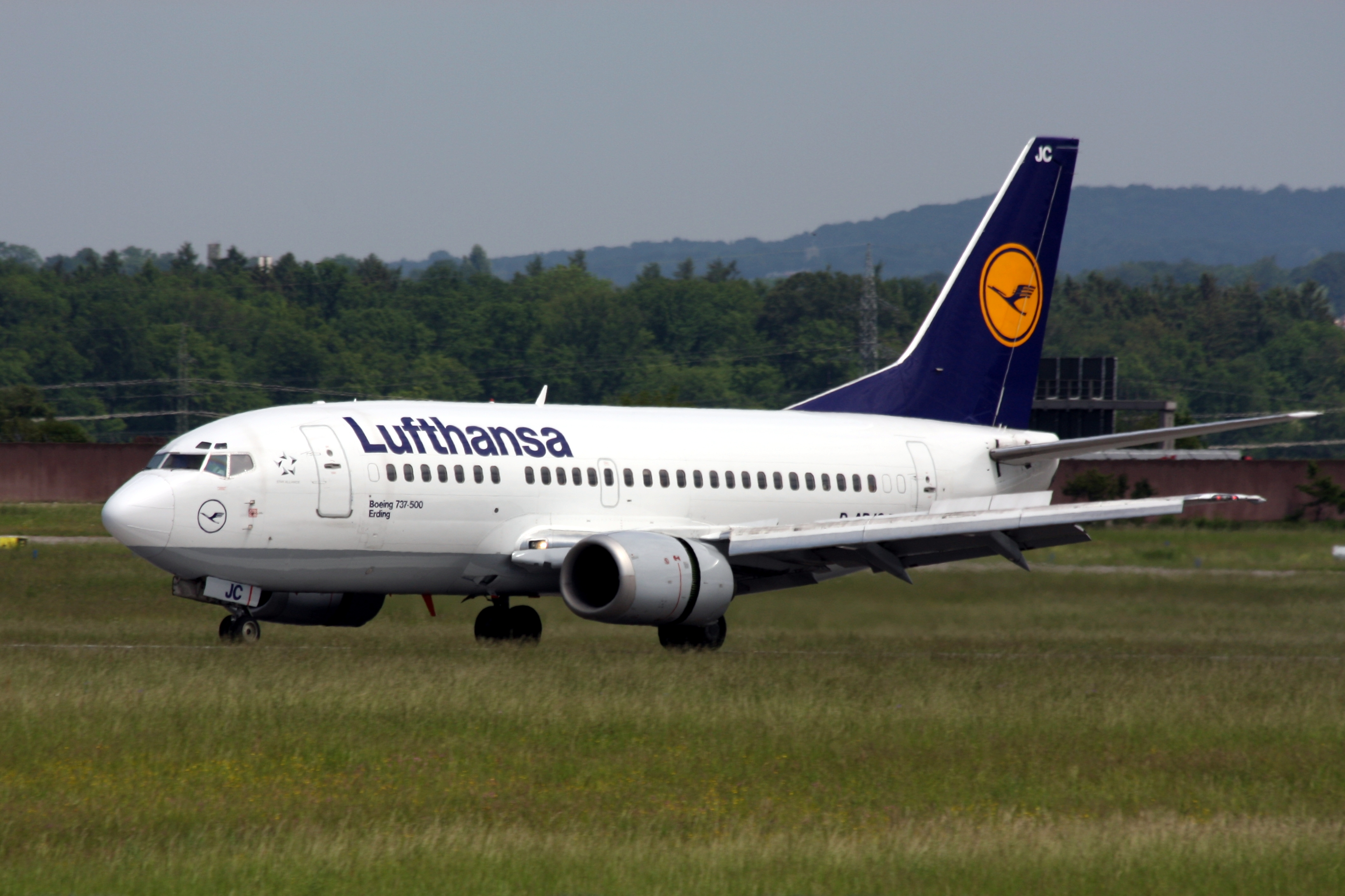 Lufthansa flight arriving from Berlin Tegel, Boeing 737-500